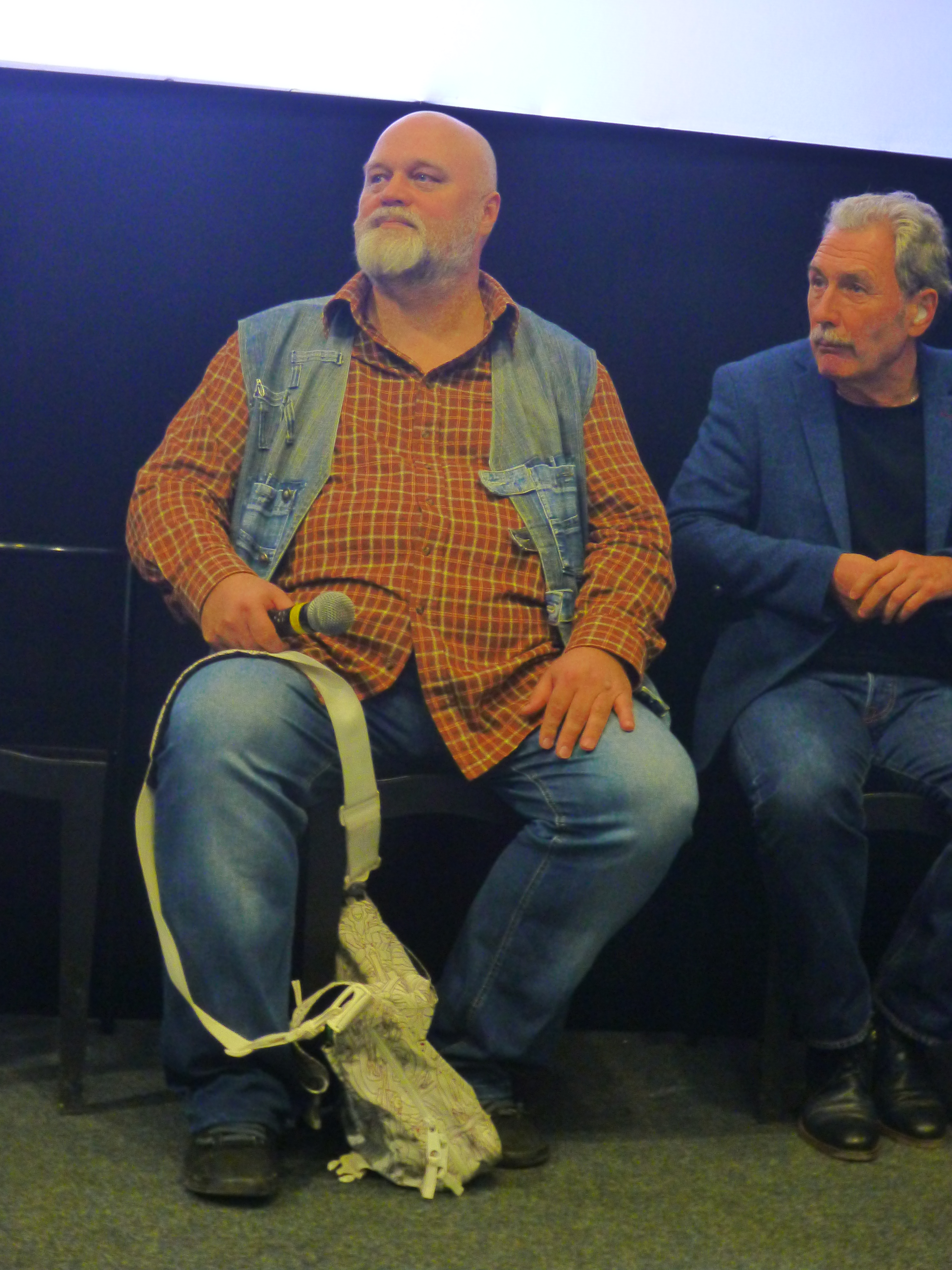 Алексей Федорченко среди участников кинофестиваля "Россия", Екатеринбург, октябрь 2019 года